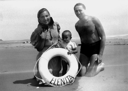 Es una foto de Elena Faggionatto de Frondizi (esposa), Elena Frondizi (hija), y Arturo Frondizi. En su casa llamada Elenita, construida por ellos.